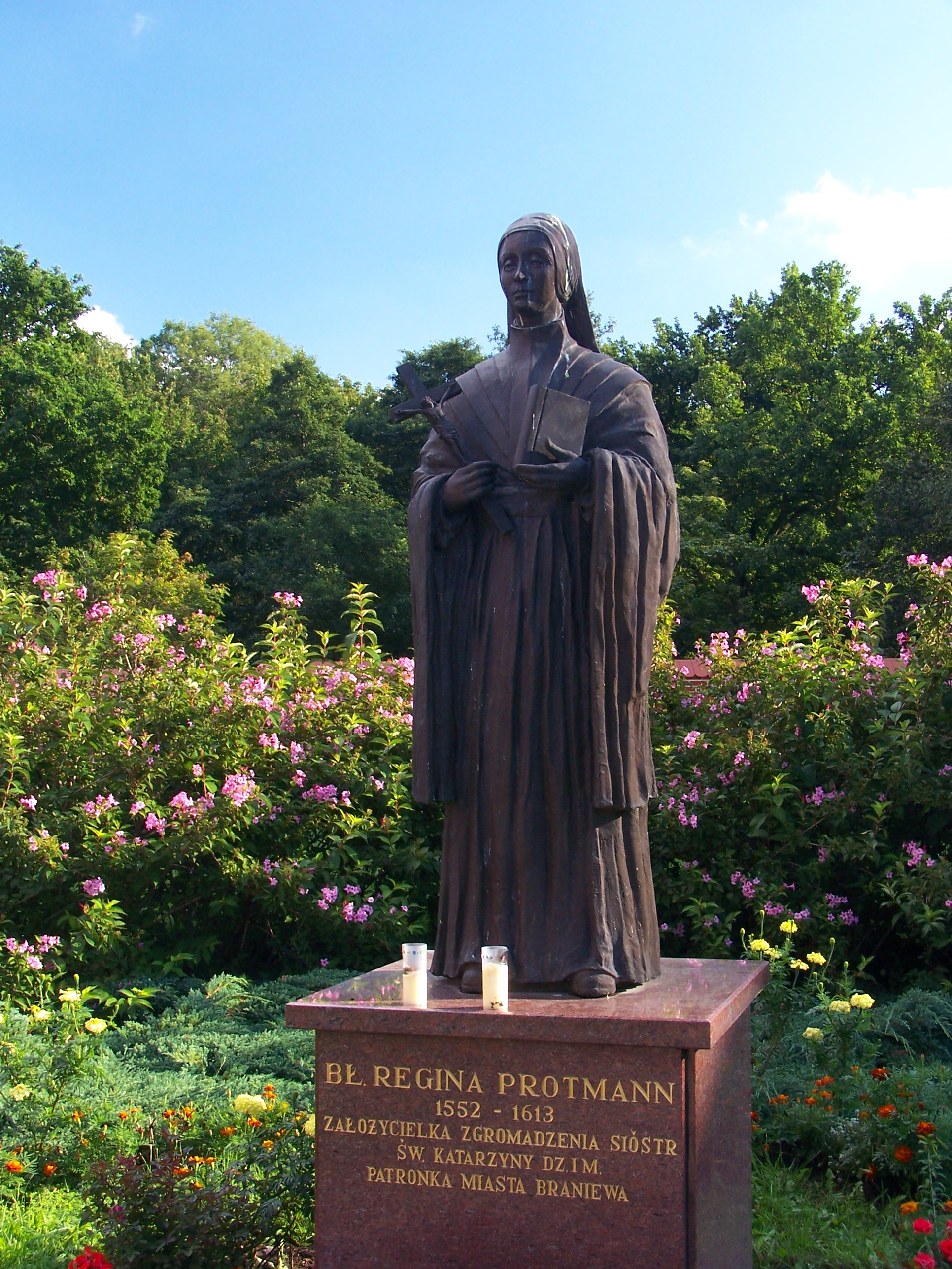 Pomnik bł. Reginy Protmann w Braniewie.